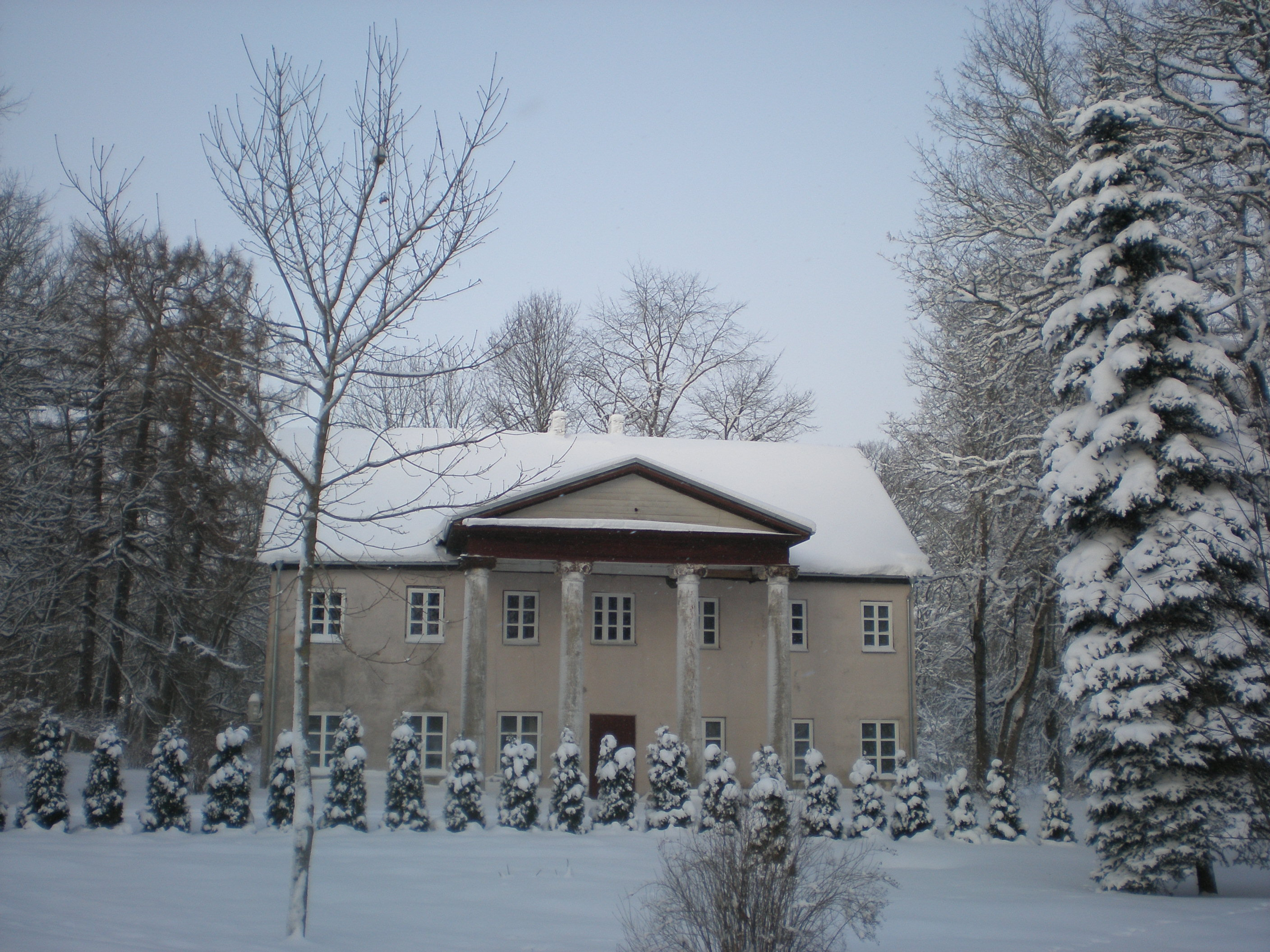 Jootme mõisa peahoone